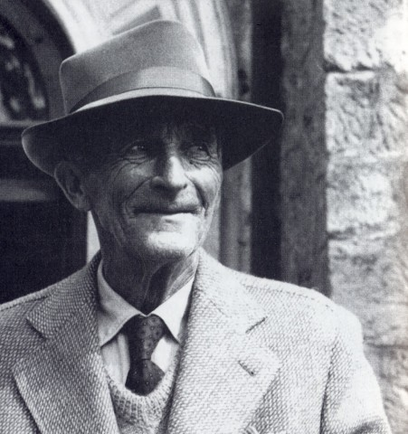 Jambor Josef (1887-1964), český malíř